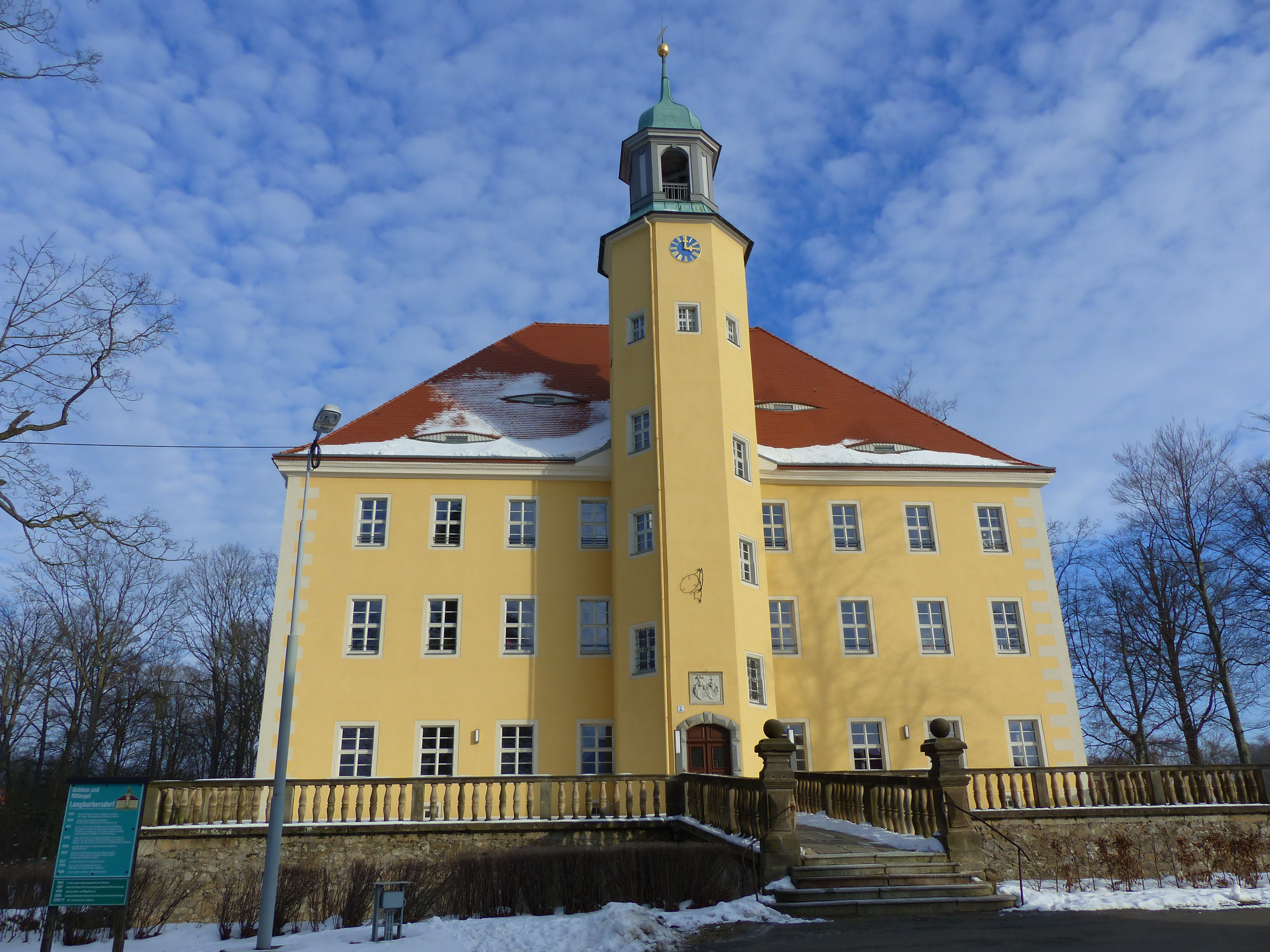 Schloss und Rittergut Langburkersdorf